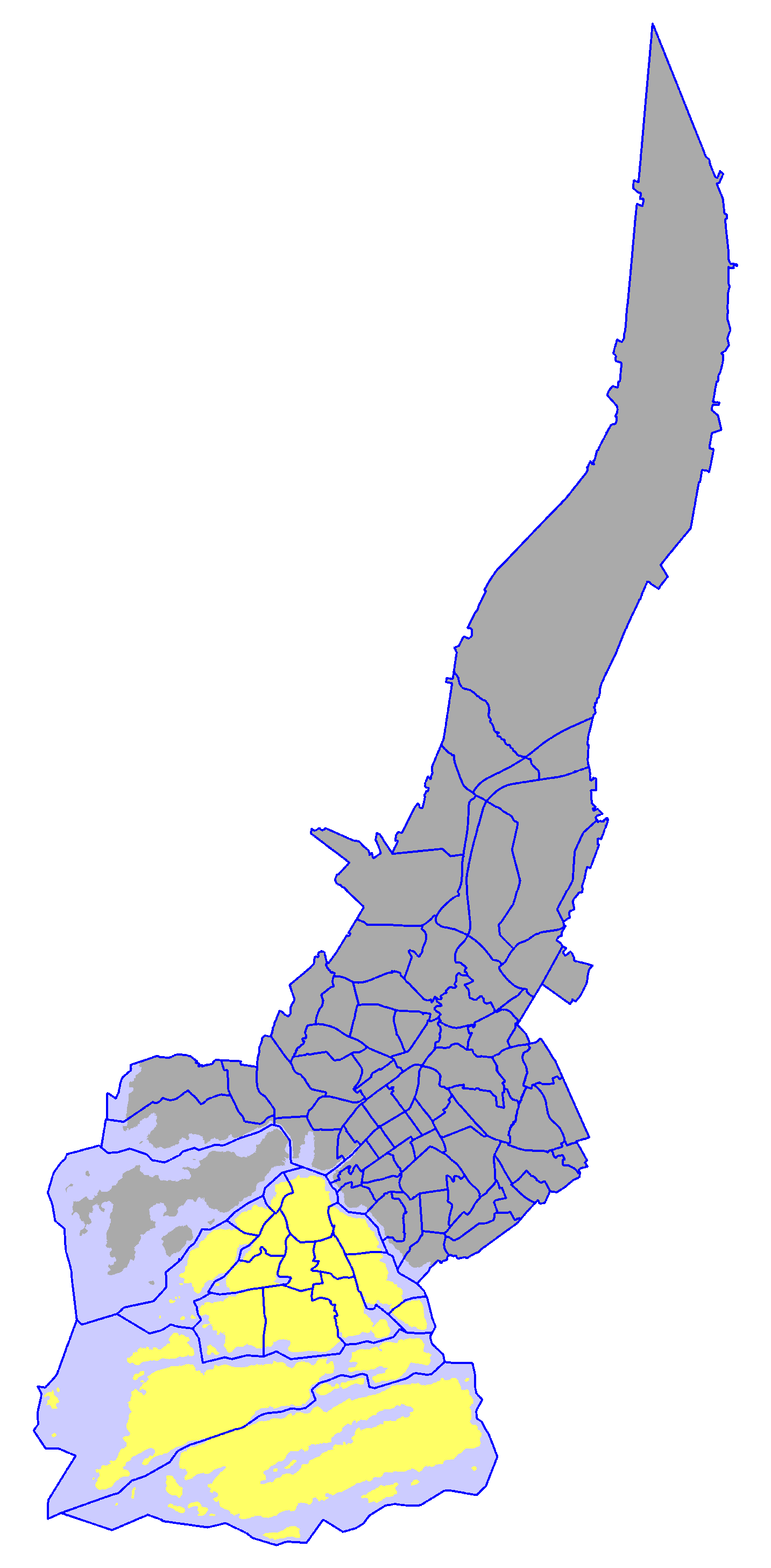 Ward of Hirvensalo-Kakskerta, in Turku